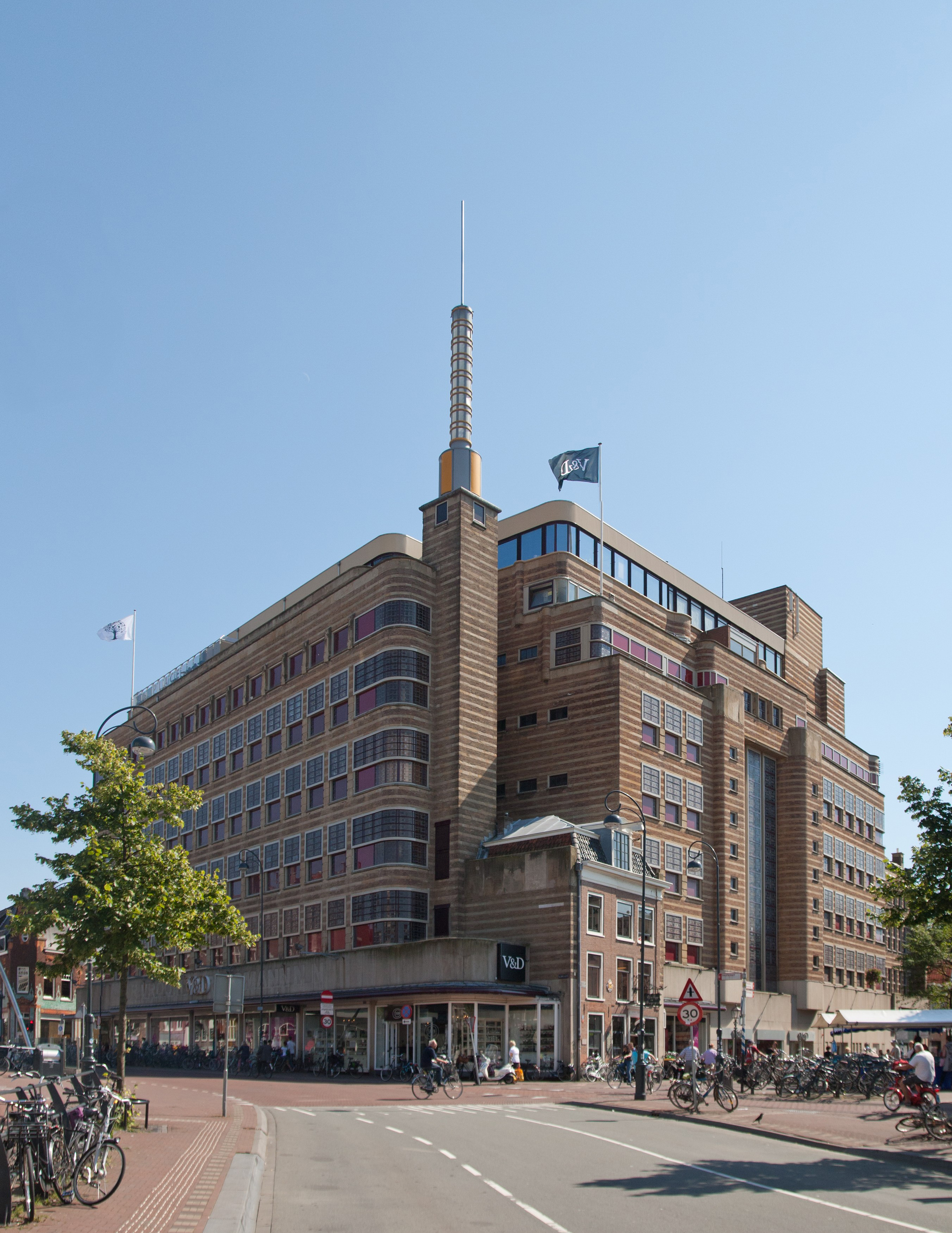 Warenhuis Vroom en Dreesman aan de Botermarkt te Haarlem